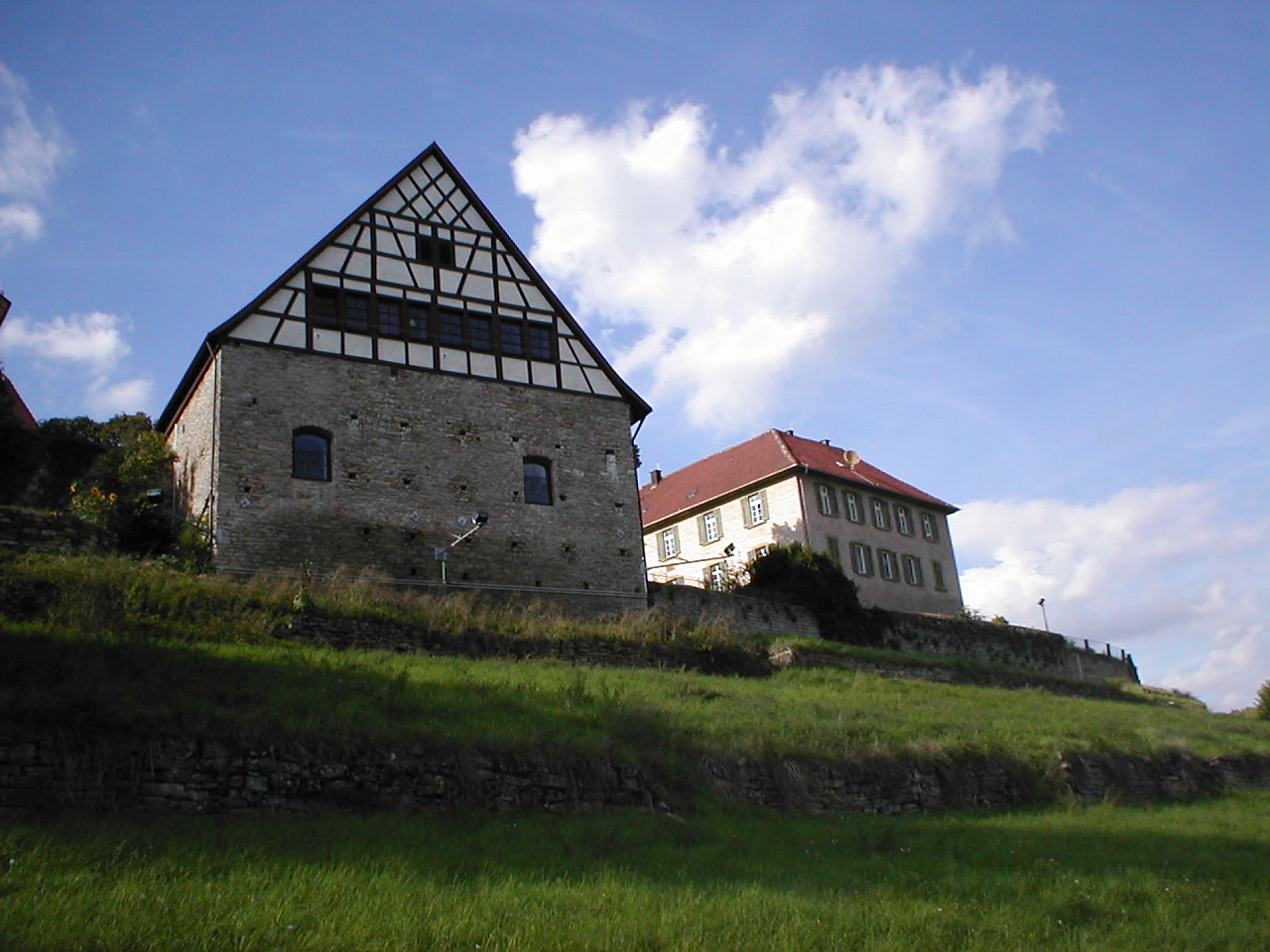 Ehemalige Burg Duttenberg